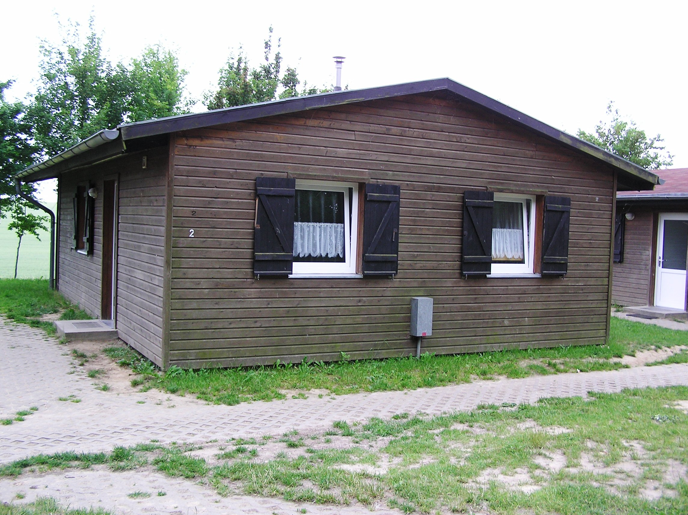 Bungalow im Dorf Barth Freigabe: OTRS Ticket#: 2006071310008417